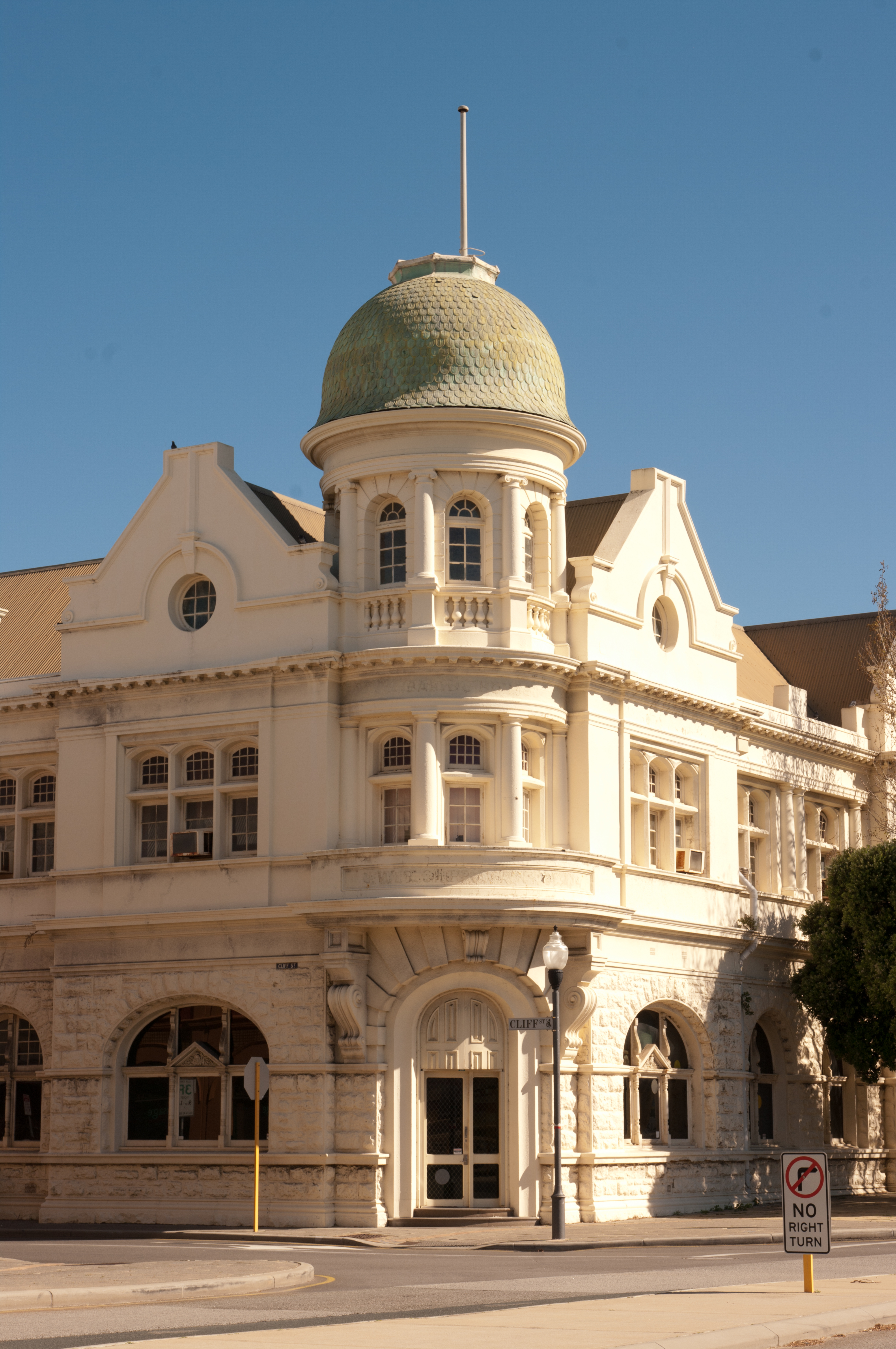 Wilhelmsen House